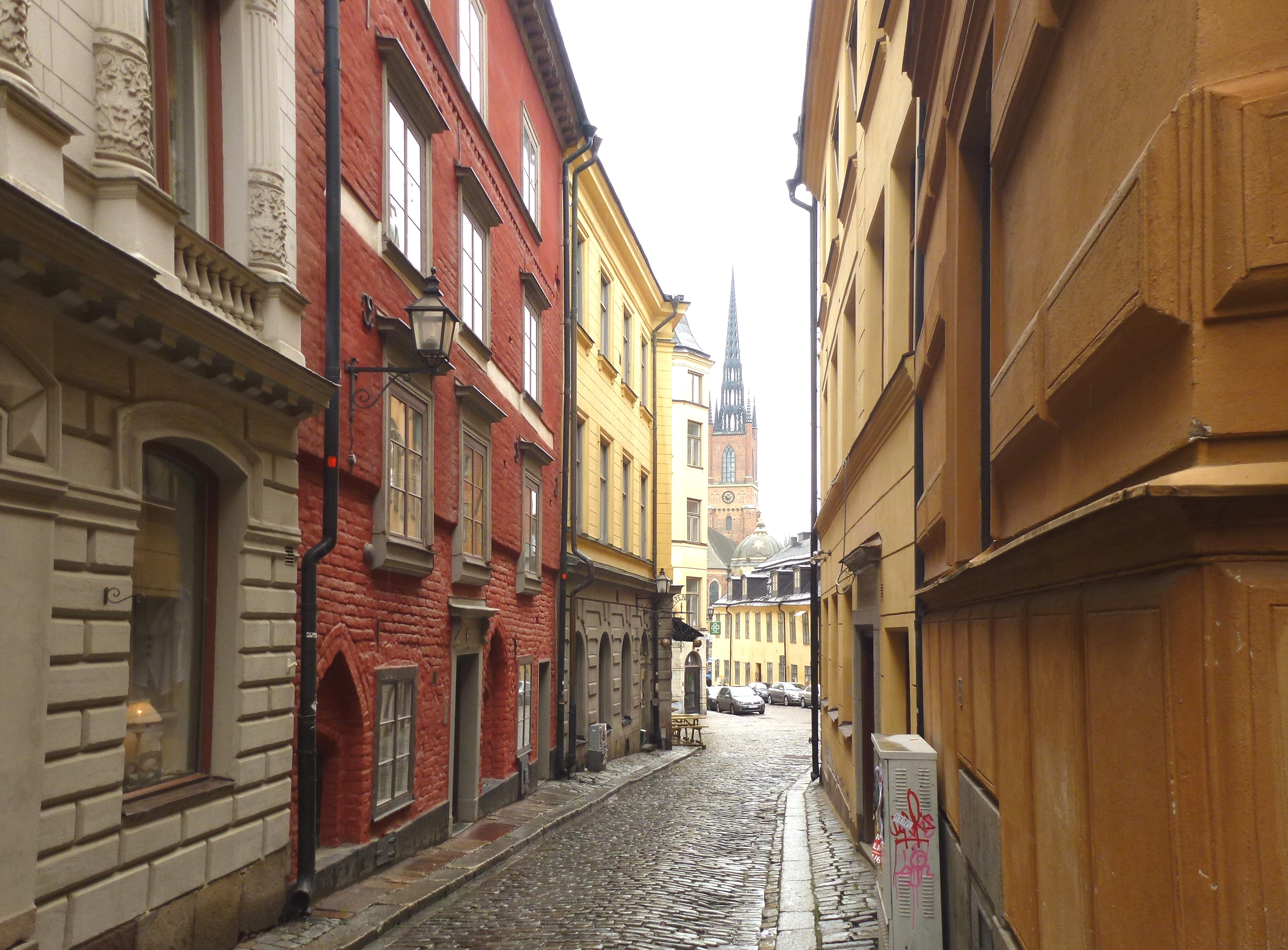 Stora Gråmungegränd vy not väst och Riddarholmen